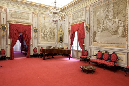 Sala de ball del Museu Romàntic Can Papiol